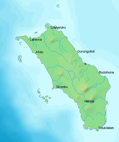 Karte der Insel Nias, Indonesien